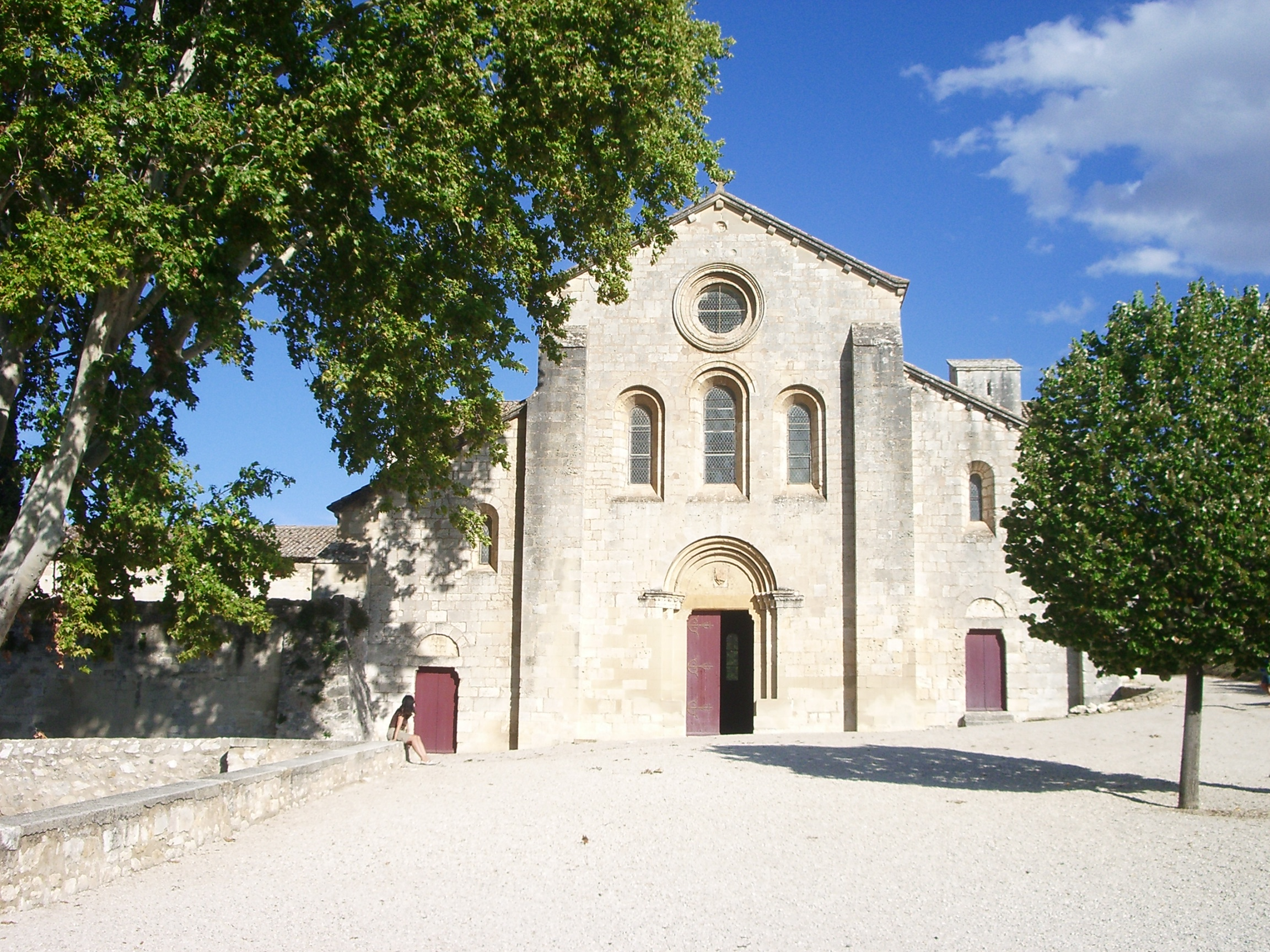 abbaye de Silvacane / Silvacane abbey - Provence, France - personal photo, 17.09.2006